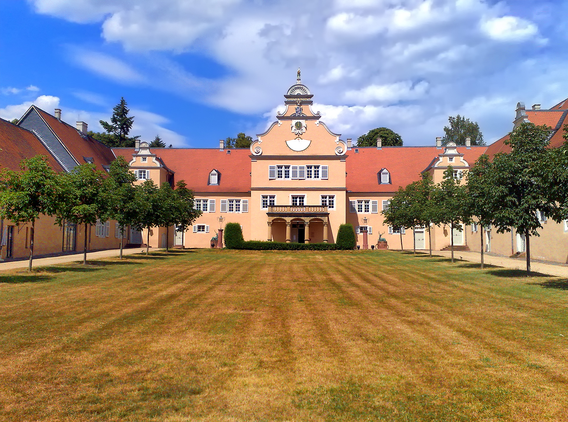 Innenhof des Jagdschloss Kranichstein bei Darmstadt